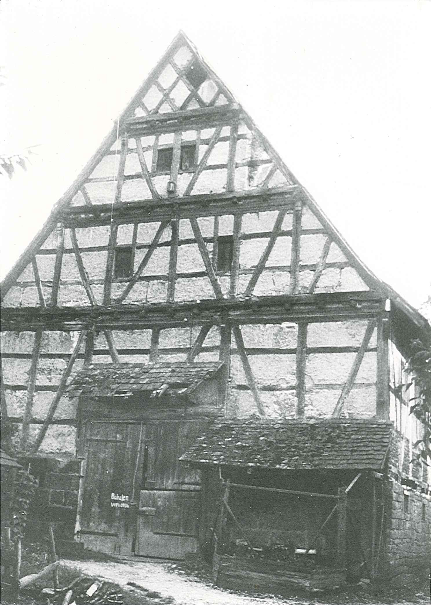 Scheune des Zwiefalter Klosterhofs in Neuhausen an der Erms kurz vor dem Abbruch, Sommer 1975